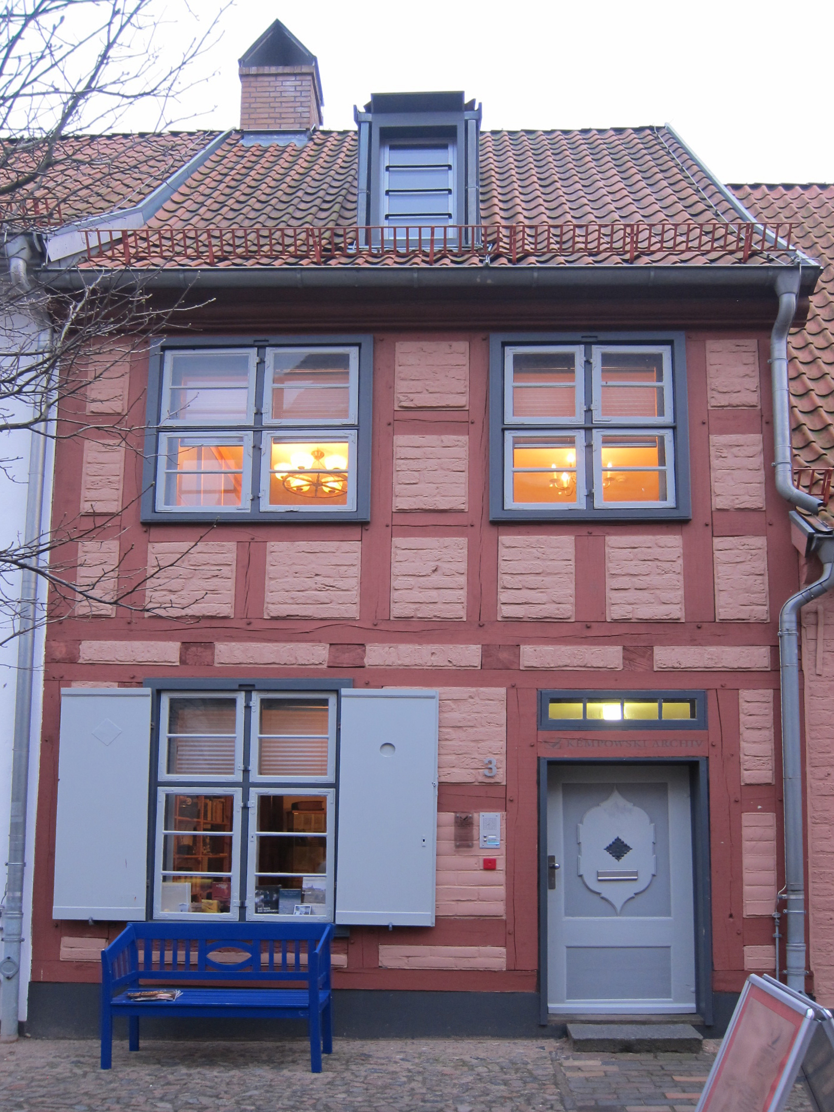 Kempowki-Archiv, Klosterhof Haus 3, 18055 Rostock. Foto aufgenommen am 18. Januar 2014